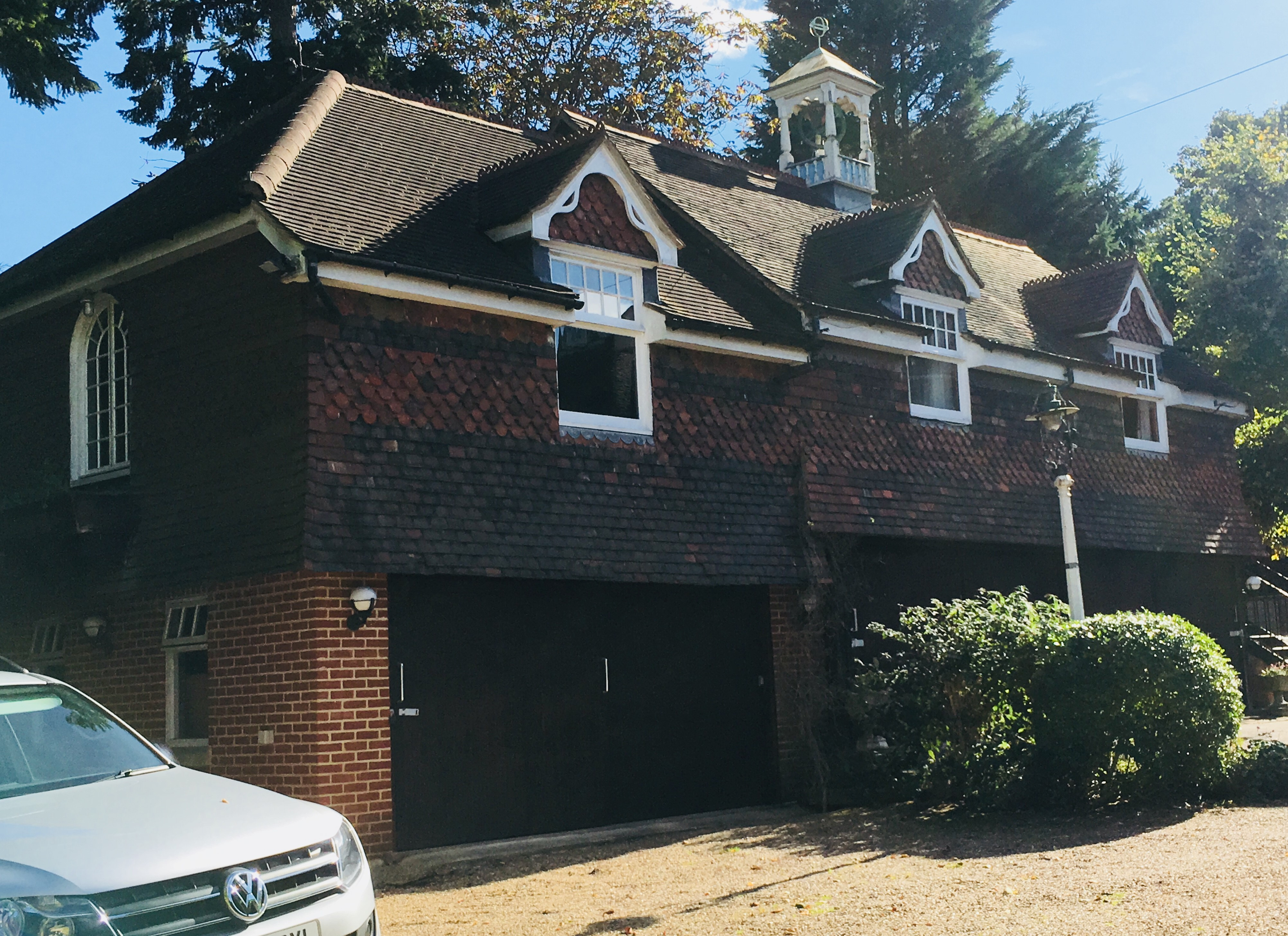 Stanley Kubrick Gästehaus in Abbots Mead, Borehamwood, in dem er seine wichtigsten Filme geschnitten hat